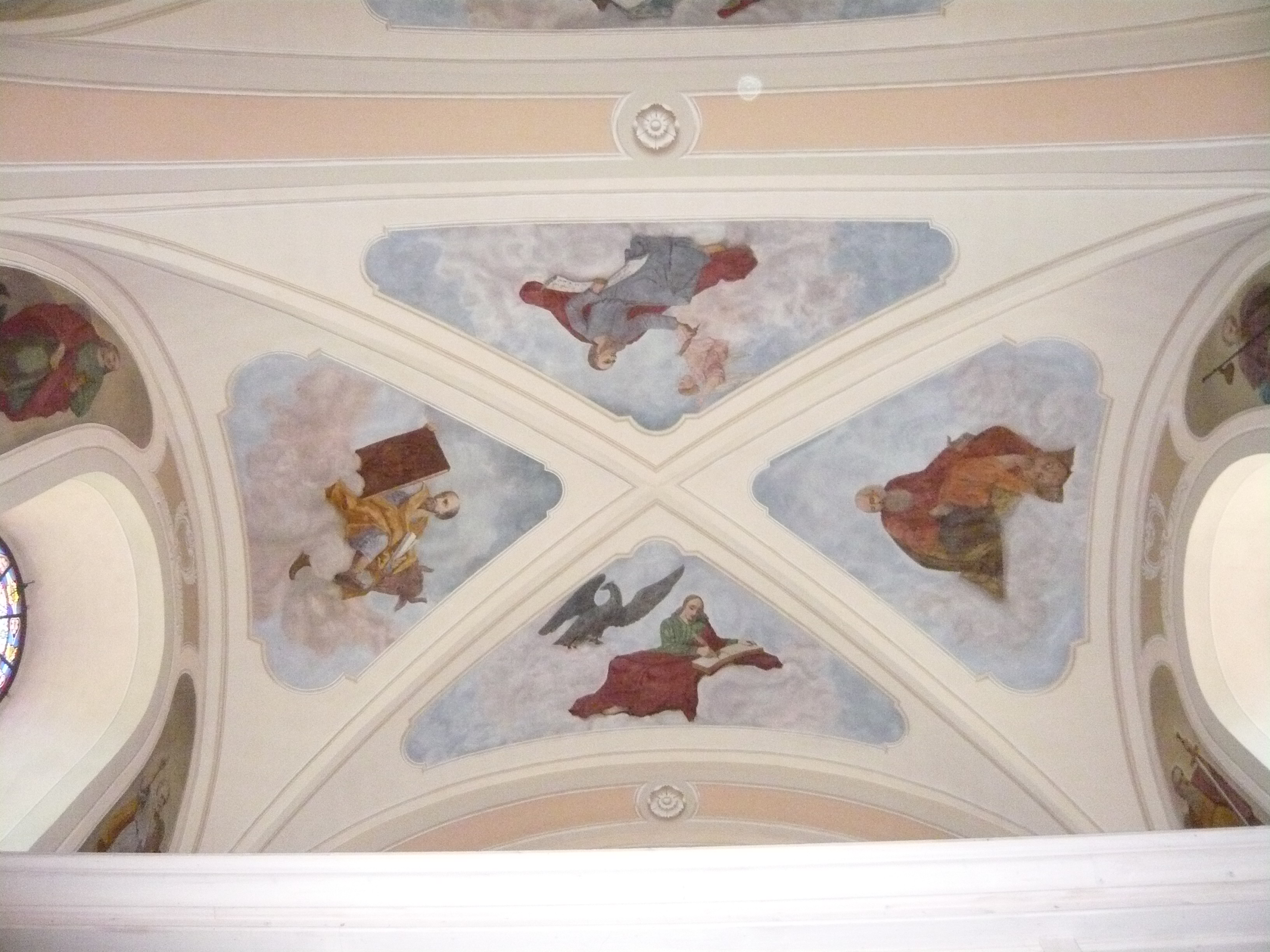 peintures des Évangélistes (église Saint-François-de-Sales d'Habère-Poche)